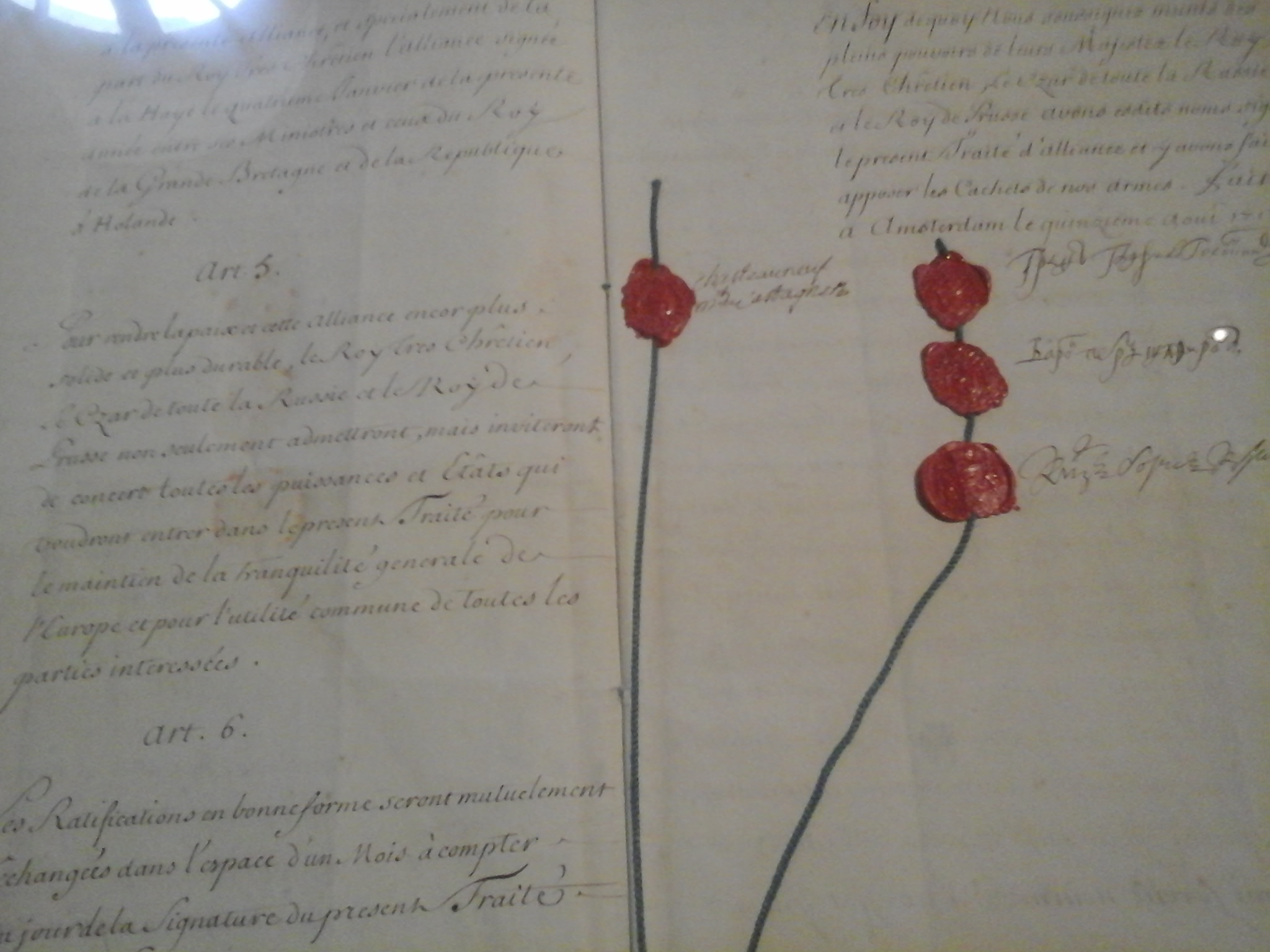 Traité d'alliance et de garantie réciproque entre la France, la Russie et la Prusse signé le 15 août 1717 à Amsterdam. Cahier fermé H 37,7 cm X L 23,7 cm. Original en français du texte signé par le royaume de France et l'empire de Russie. Cahier papier de 24 pages ; page de signatures présentant 4 cachets de cire rouge sur cordon de soie. Alternat français portant les signatures à gauche de Pierre-Antoine de Châteauneuf, marquis de Castagnères, ambassadeur de France auprès des Provinces-Unies ; à droite, signatures des plénipotentiaires russes : le comte Golovkine (chancelier), le baron Chafirov (vice-chancelier) et le prince Kourakine (ambassadeur de Russie auprès des Provinces-Unies). Document conservé à Paris aux Archives du ministère des Affaires étrangères. Traités multilatéraux 17170003/01. Présenté en 2017 à l'exposition Pierre le Grand, un tsar en France 1717 au Grand Trianon.